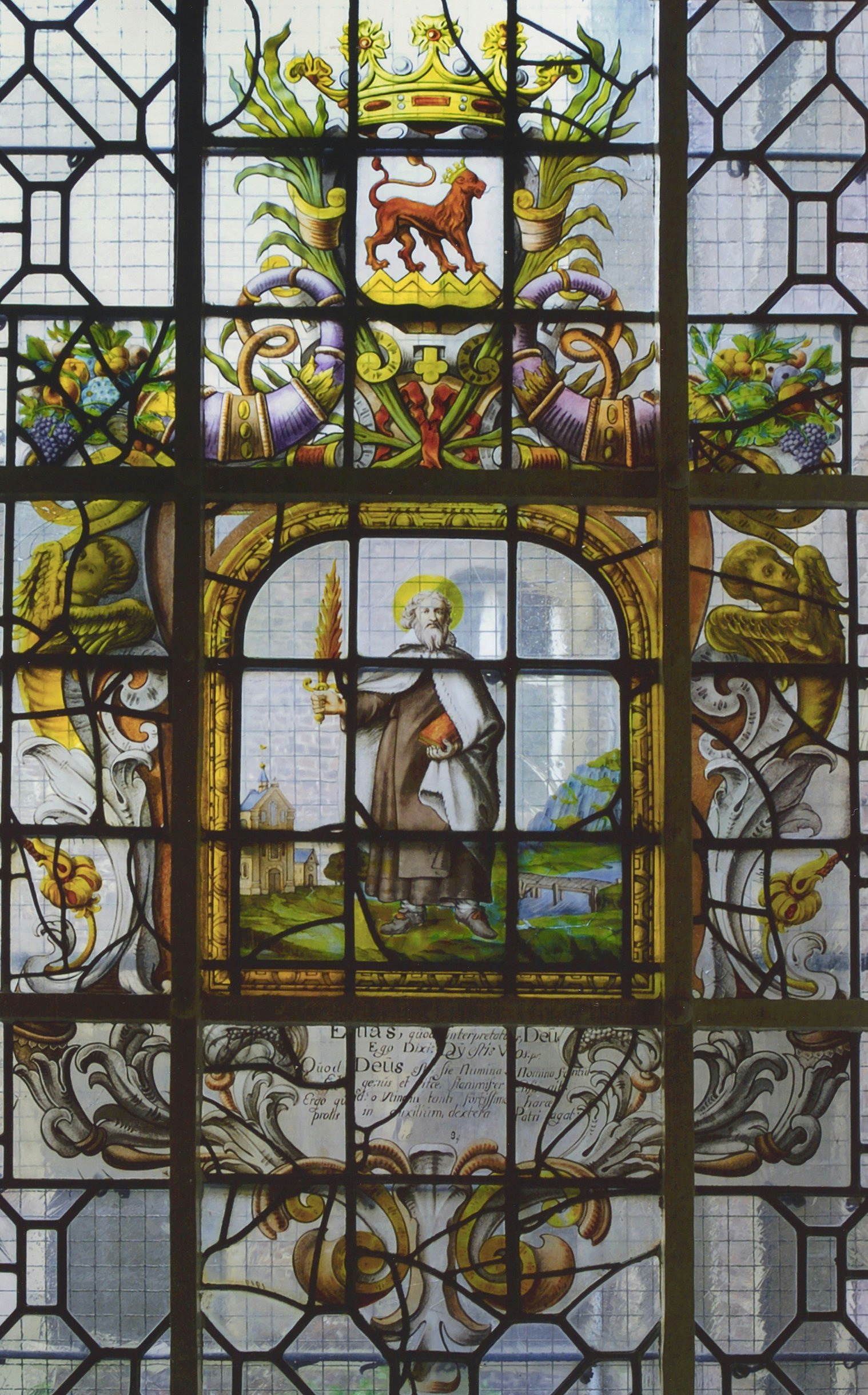 Karmelietenklooster: Interieur, pandhof, glas-in-loodraam: titel: Elia